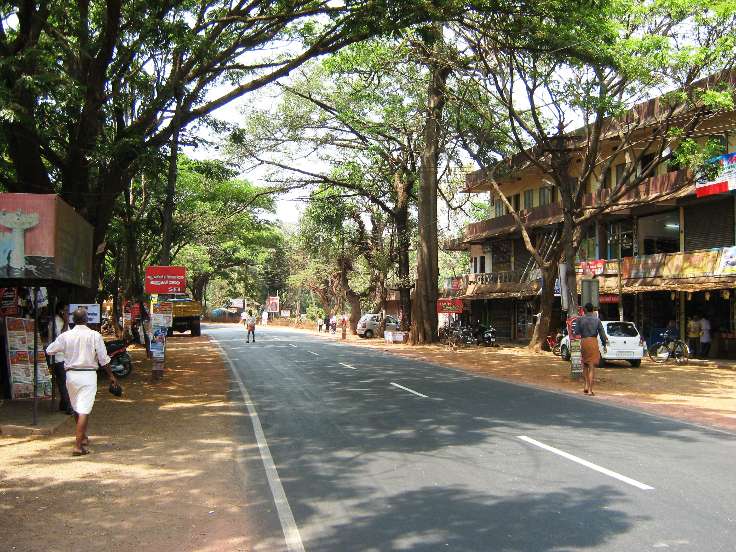 Payyannur, Kerala, India.